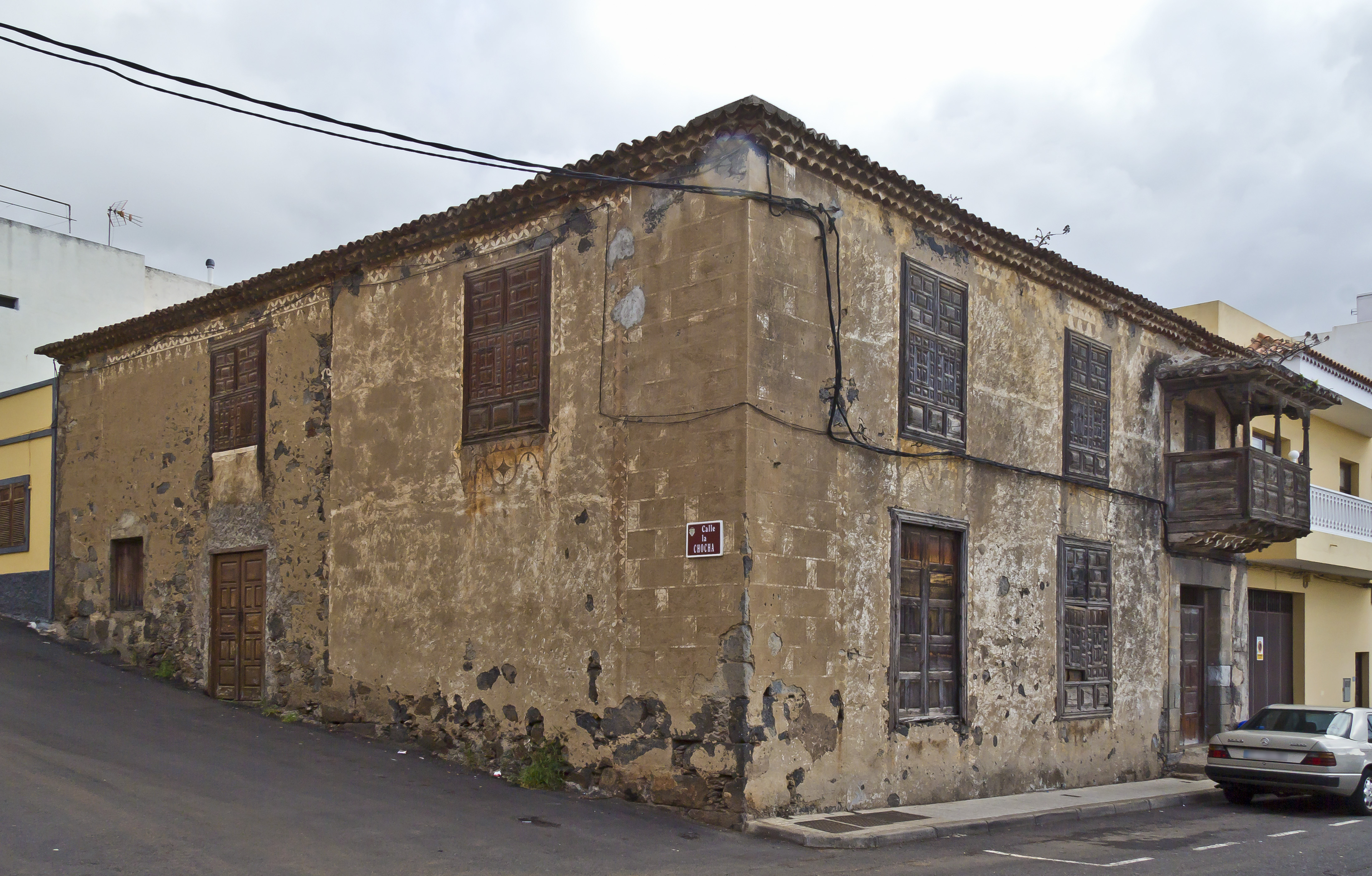 La Casa del Capitán ist ein Gebäude aus dem 17. Jahrhundert in Santa Ursula in der Provinz Santa Cruz de Tenerife.